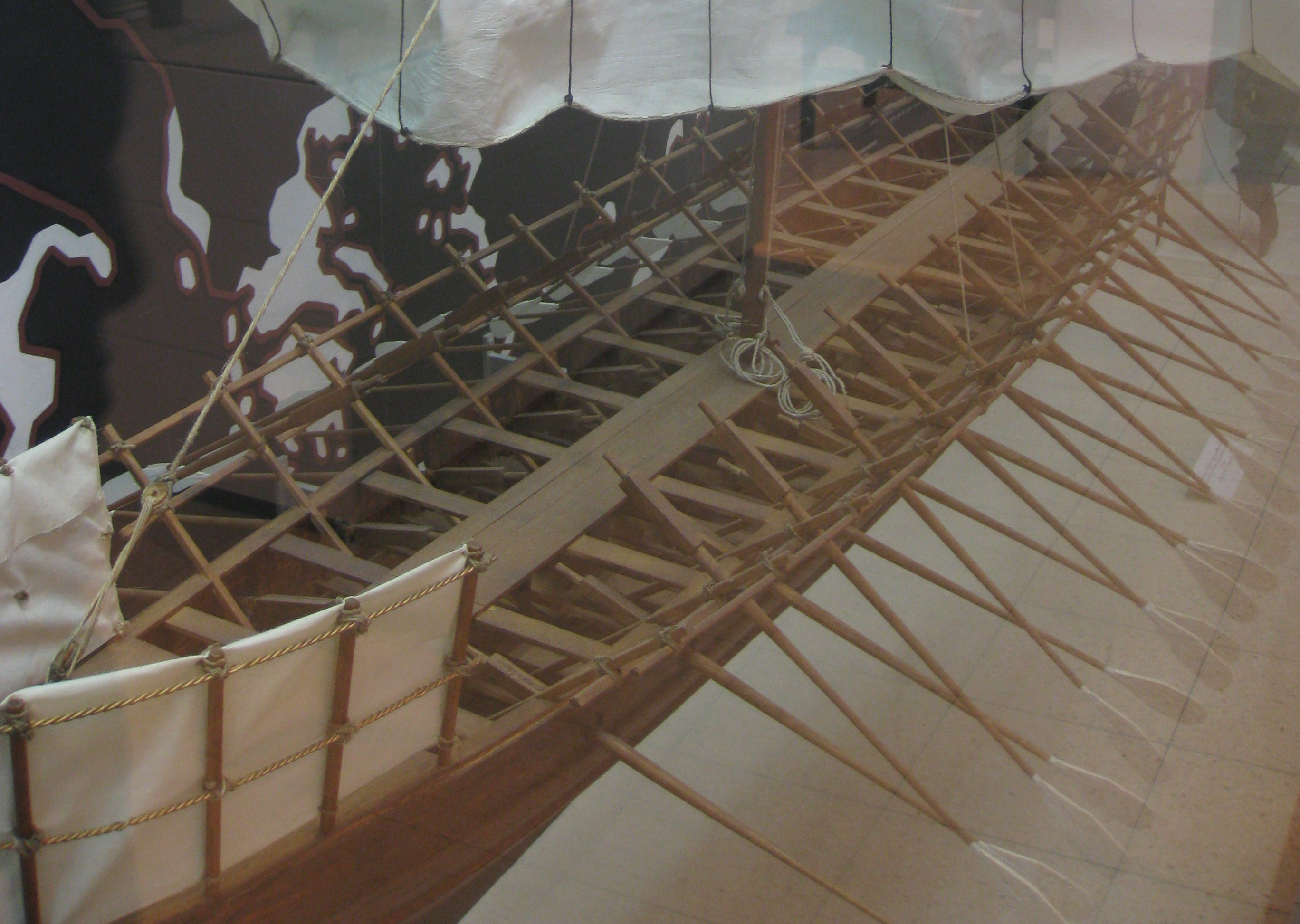 National Maritime Museum, Israel - Ship Models A modern model of a Greek warship (Bireme. Reconstruction according to illustration on a pottery dish. 5th Century BC. wood. Scale: 1:12. Model built by Alexander Blokhin. המוזיאון הימי הלאומי בחיפה דגמי ספינות דגם מודרני של אוניית מלחמה יוונית (בירמה). הדגם נבנה על בסיס איור שהתגלה על כלי חרס. ספינות מסוג זה היו בשימוש במאה החמישית לפני הספירה. קנ"מ: 1:12. הדגם, מעשה ידי אלכסנדר בלוכין